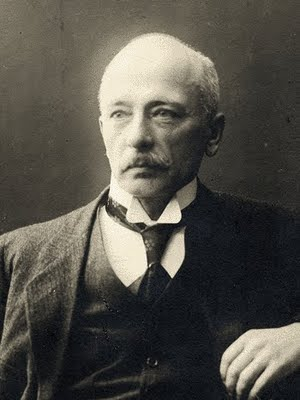 Ээро Ярнфельт, финский художник